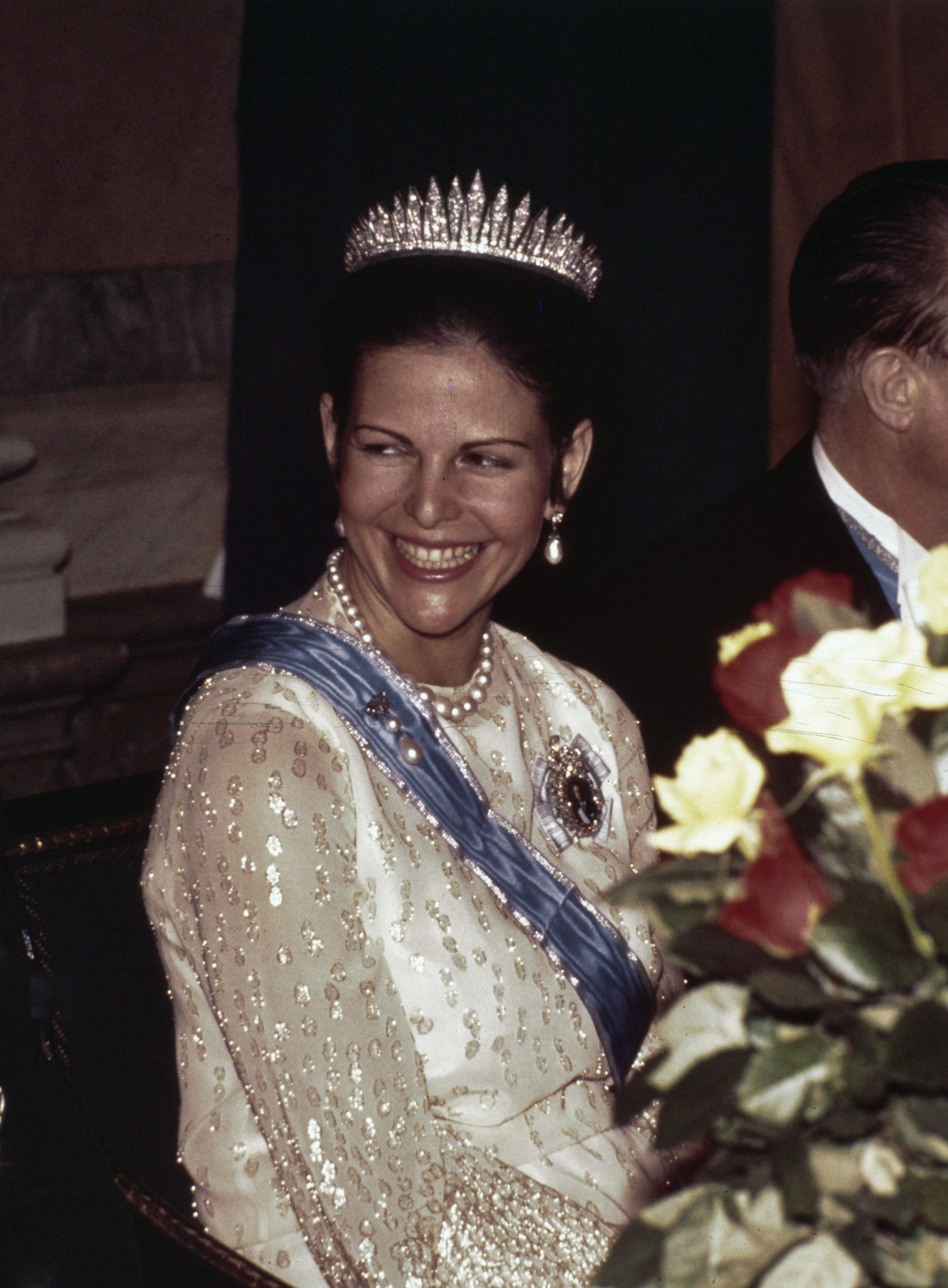 Collectie / Archief : Fotocollectie Anefo Reportage / Serie : [ onbekend ] Beschrijving : Sylvia Sammerlath (Zweedse Koningin), koppen Datum : 30 maart 1977 Trefwoorden : koninginnen Fotograaf : Suyk, Koen / Anefo Auteursrechthebbende : Nationaal Archief Materiaalsoort : Dia (kleur) Nummer archiefinventaris : bekijk toegang 2.24.01.06 Bestanddeelnummer : 254-9863